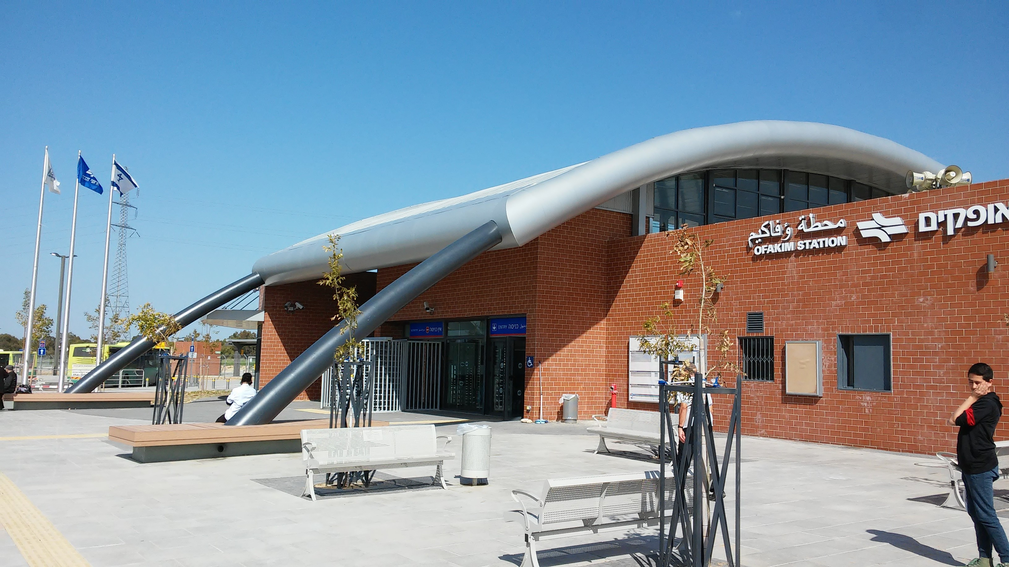 Ofakim train station